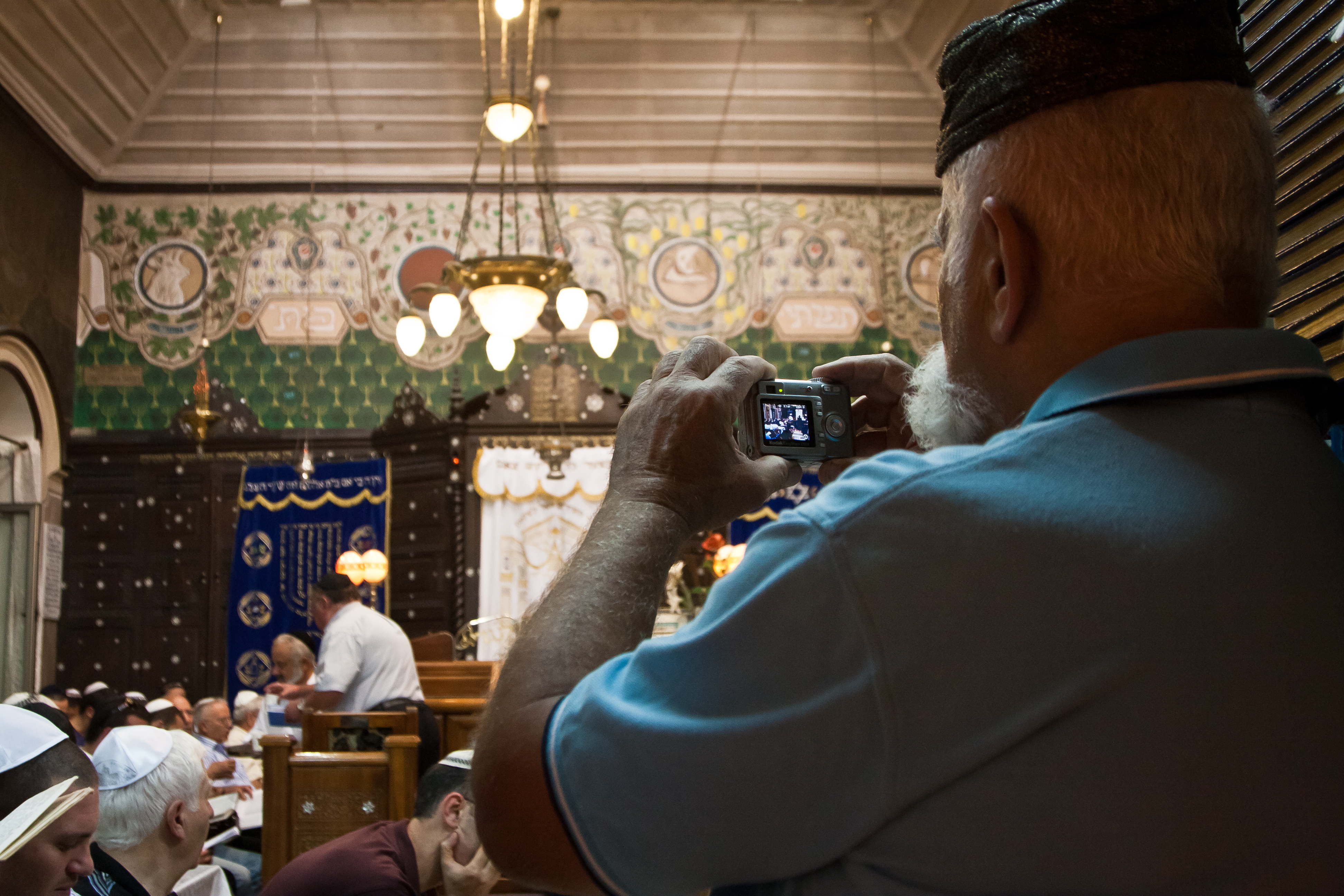 בית הכנסת עַדֶס בשכונת נחלת ציון בירושלים, הוא המפואר בבתי הכנסת בנחלאות. הוקם על ידי בני משפחת עַדֶס מחאלב. קירות אולם התפילה מעוטרים בציורי קיר שנעשו בשנים 1912-1913 על ידי תלמידי בצלאל בהנחיית האמן יעקב שְטָרק, שחתימתו מתנוססת באחת הפינות.